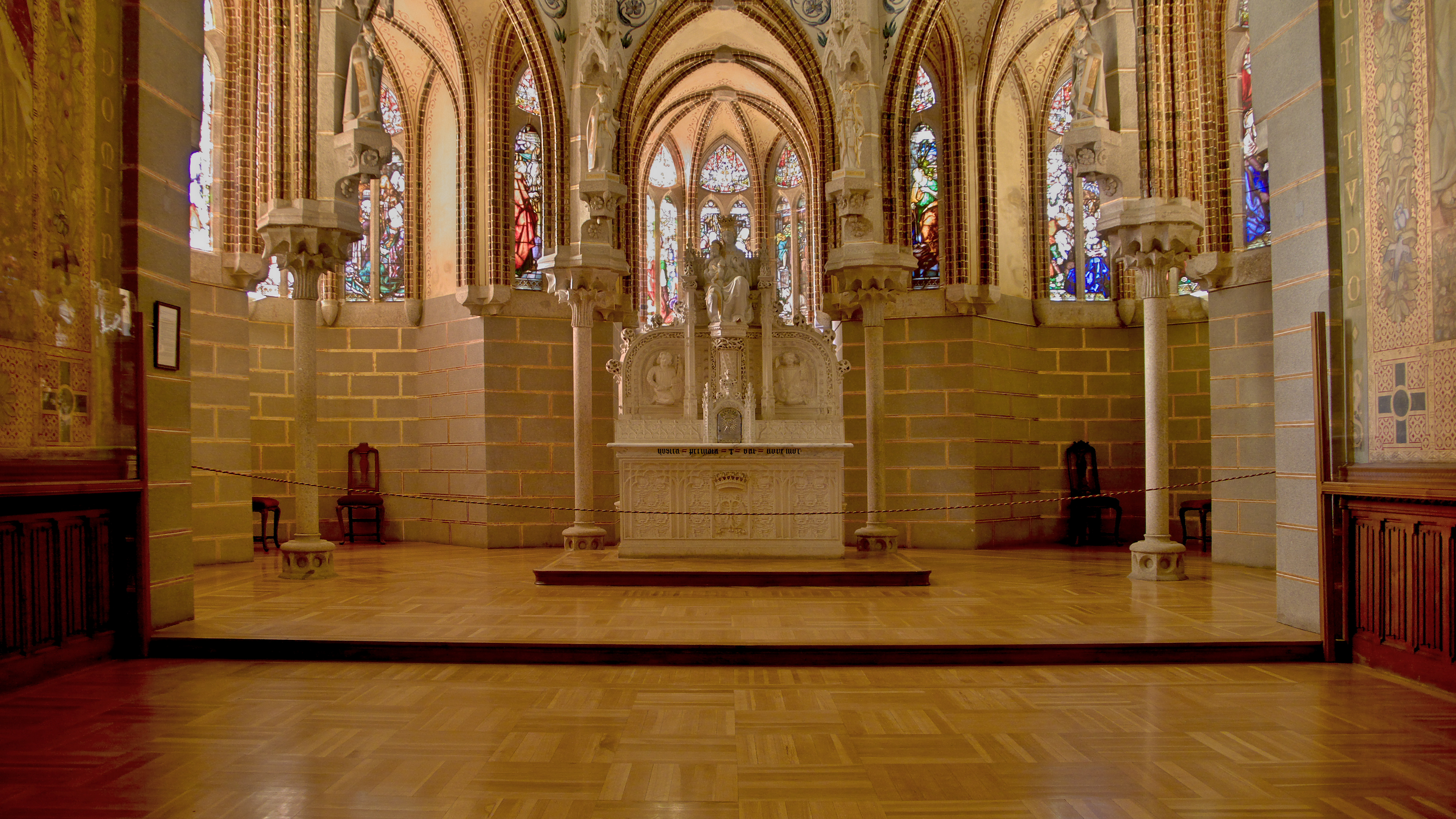 Presbiterio de la capilla